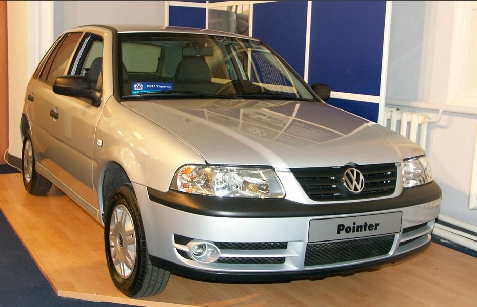 Volkswagen Pointer 2003 de México